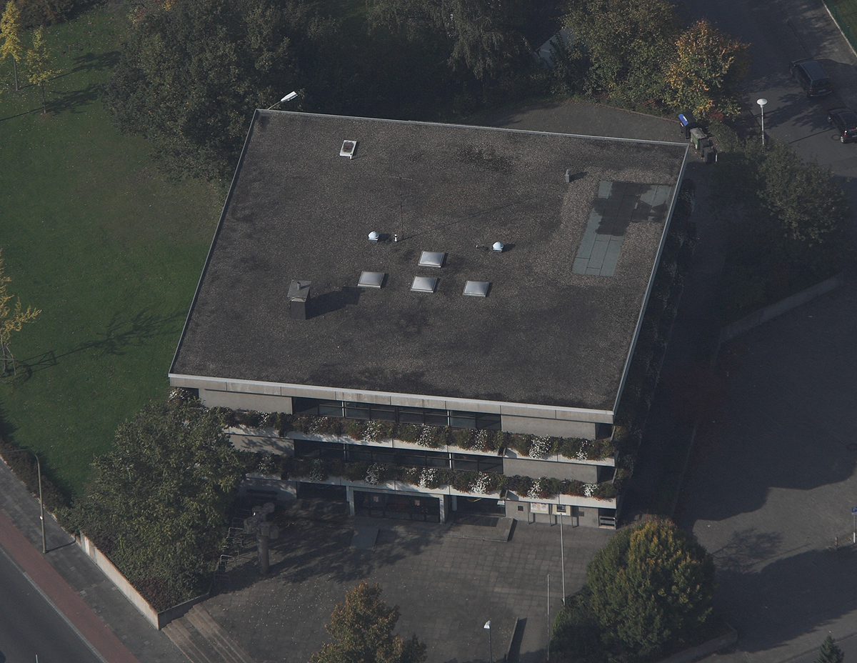 Luftbildaufnahme Hamm